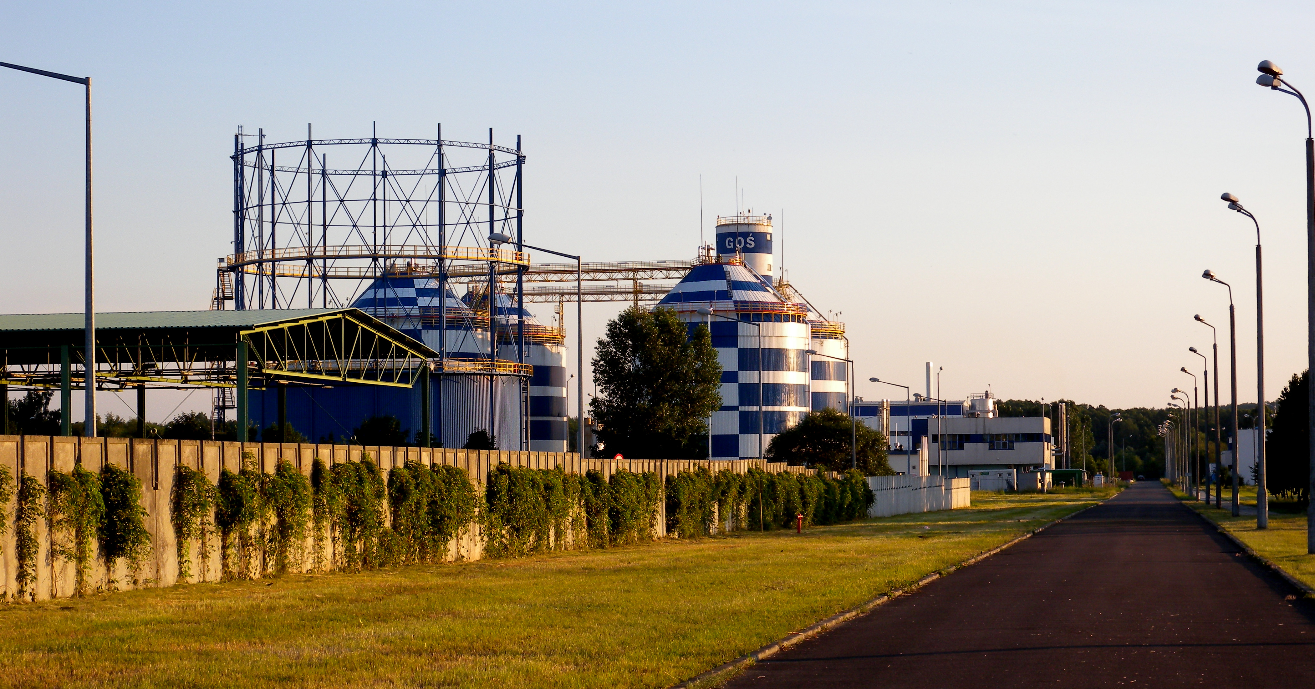 Grupowa Oczyszczalnia Sciekow w Lodzi